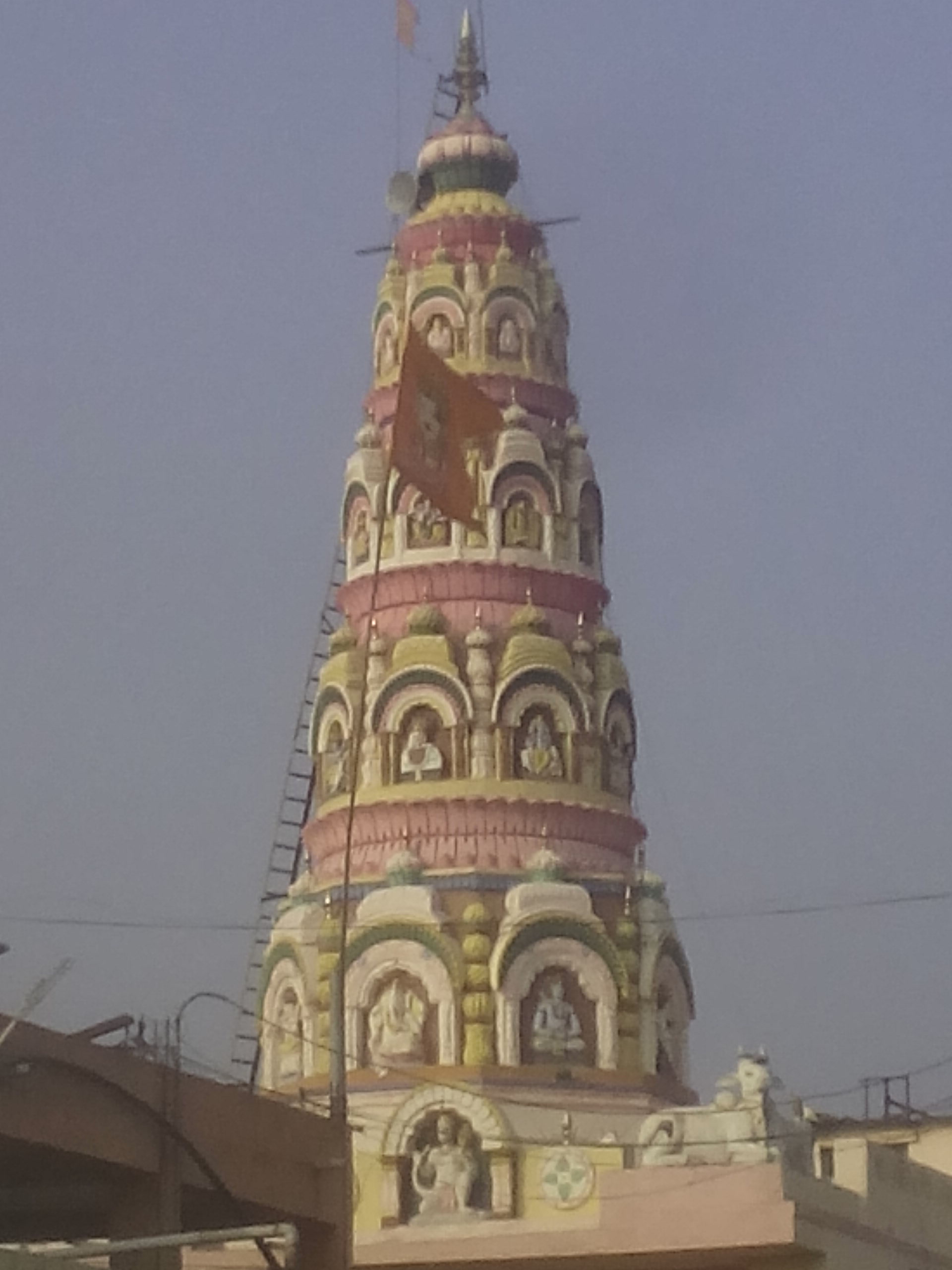 या गोलाकार दगडावरतीच राम बसले होते.